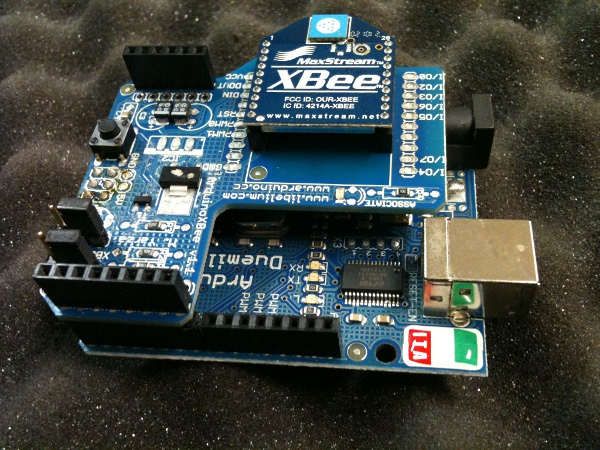 Montage d'une carte xbee sur une carte arduino